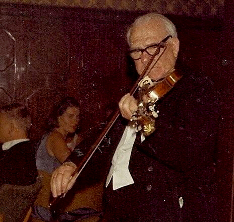 The fiddlemaker John G Helland playing at a privat party in Skien in 1970 John G Helland underholder i et privat selskap i Skien i 1970